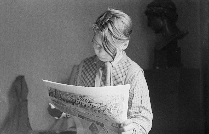 Original image description from the Deutsche FotothekEin "Der junge Ponier" lesender Pionier